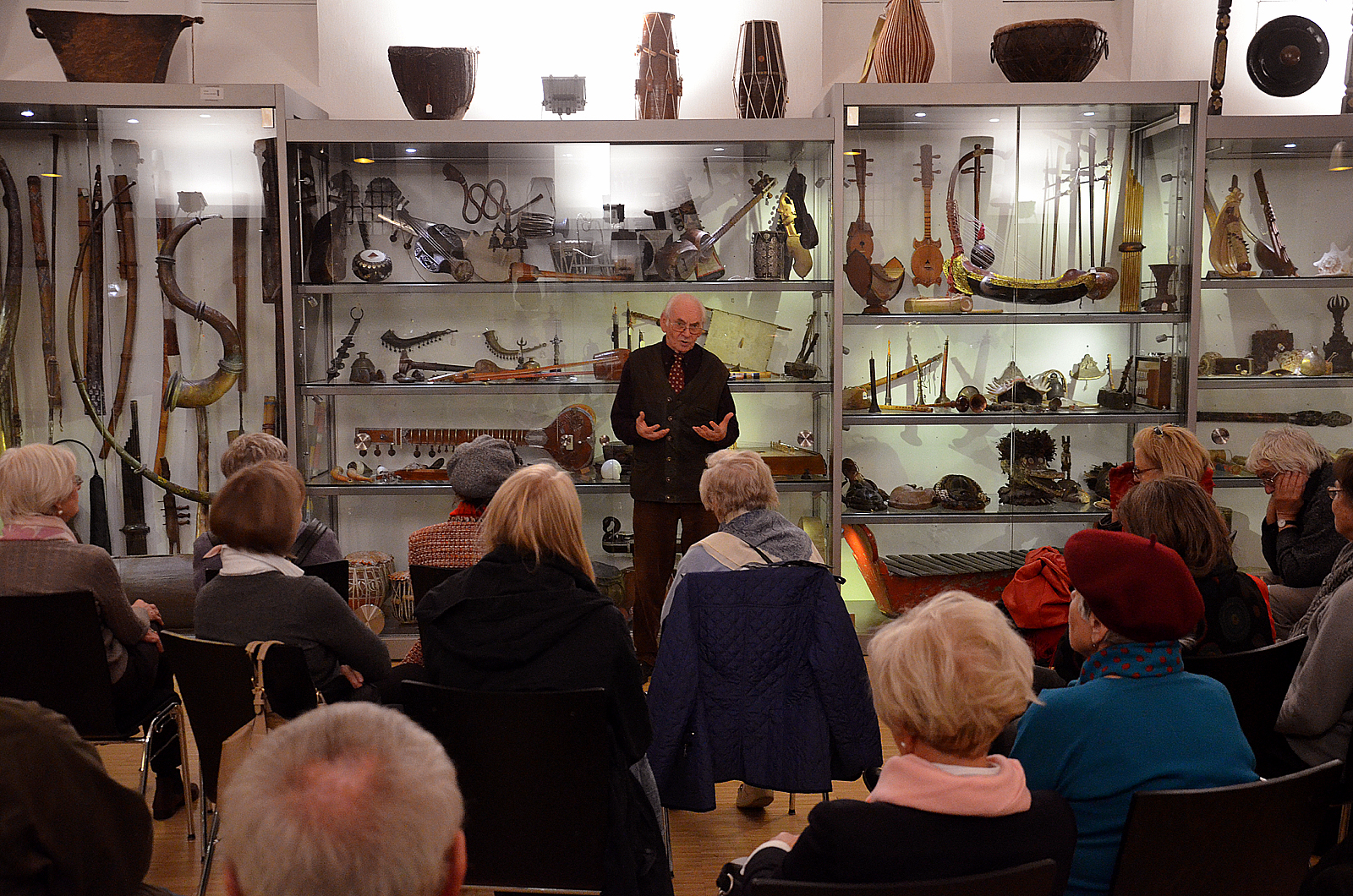 Der Musikethnologe Rolf Irle erläutert vor Mitgliedern und Gästen des Freundeskreises Hannover die von ihm gestiftete Musikinstrumente-Sammlung im Center for World Music, heute Teil der Stiftung Universität Hildesheim ...